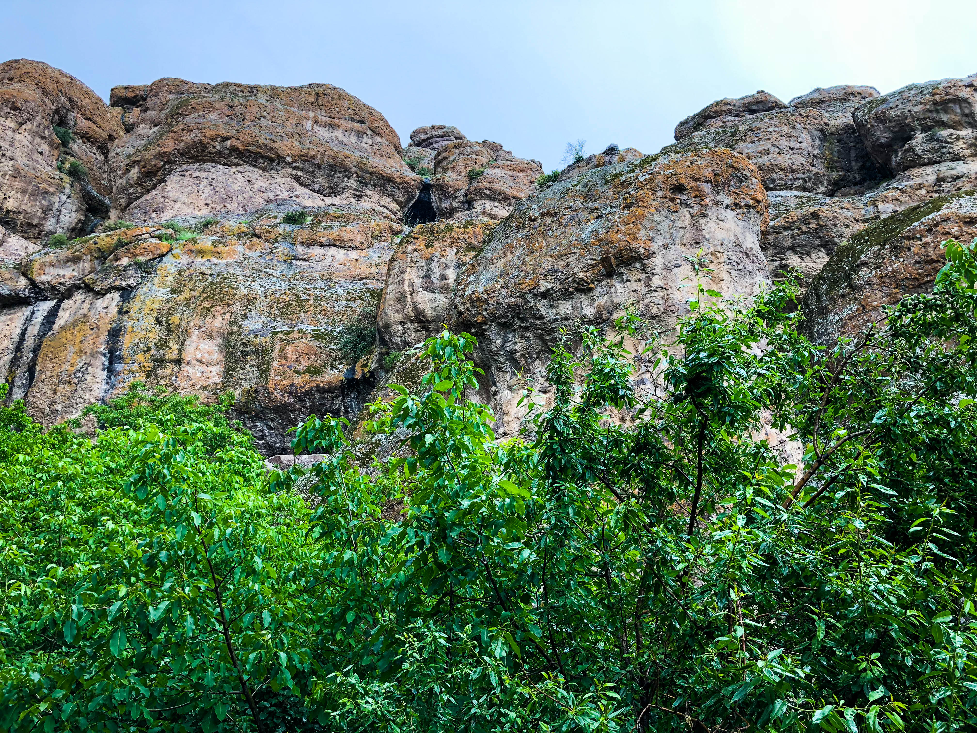 Əshabi-Kəhf dağı